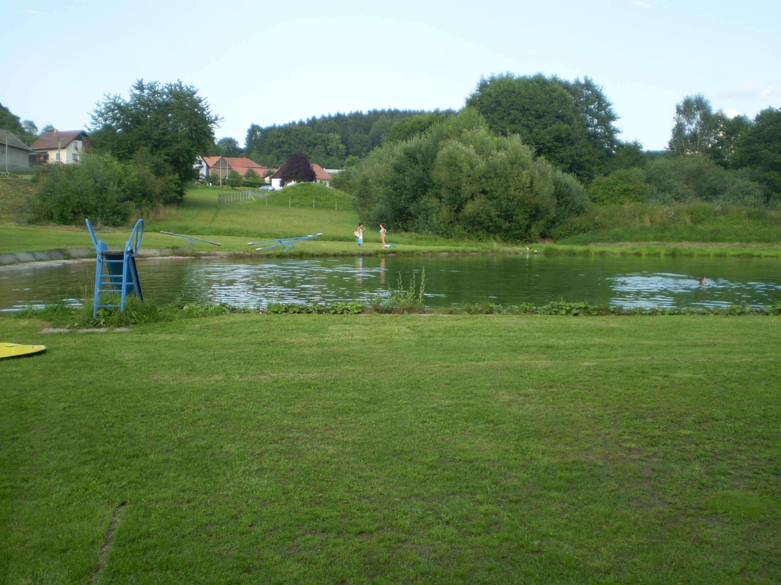 Nádrž na Záskalském potoce ve vesnici Čtyři Dvory (obec Prosetín, okres Žďár nad Sázavou).